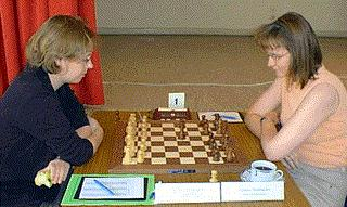 Anke Koglin und Claudia Steinbacher, 36. Deutsche Frauen-Einzelmeisterschaft 2001 in Krefeld.